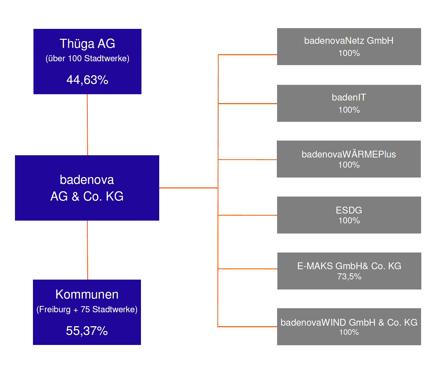 Beteiligungsstruktur badenova AG & Co. KG